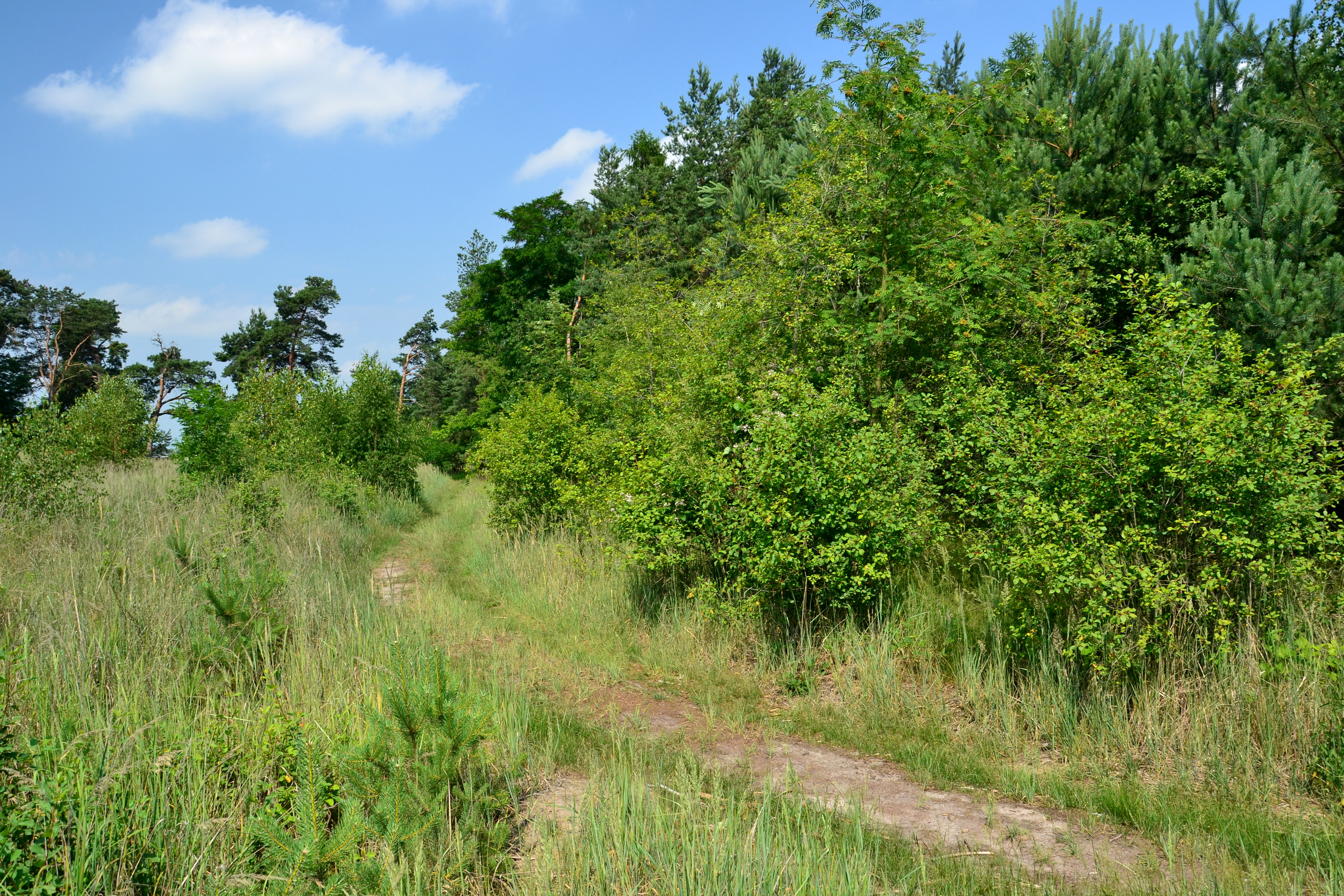 Přírodní památka Píščiny u Oleška